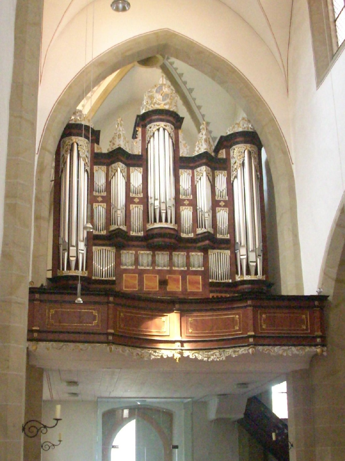 Kloster Marienrode, St. Michael, Orgel